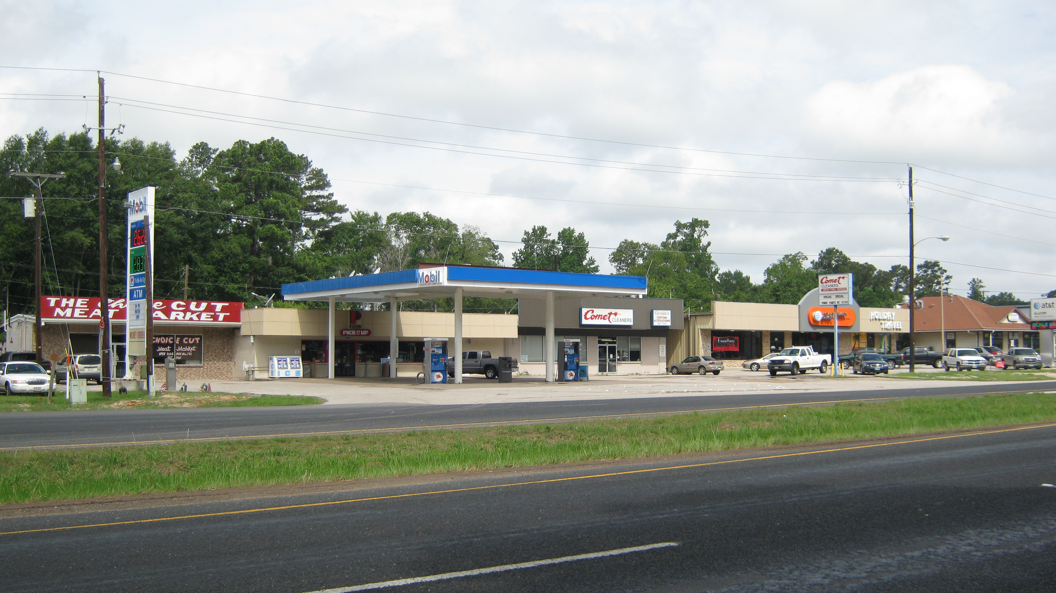 1004 S John Redditt